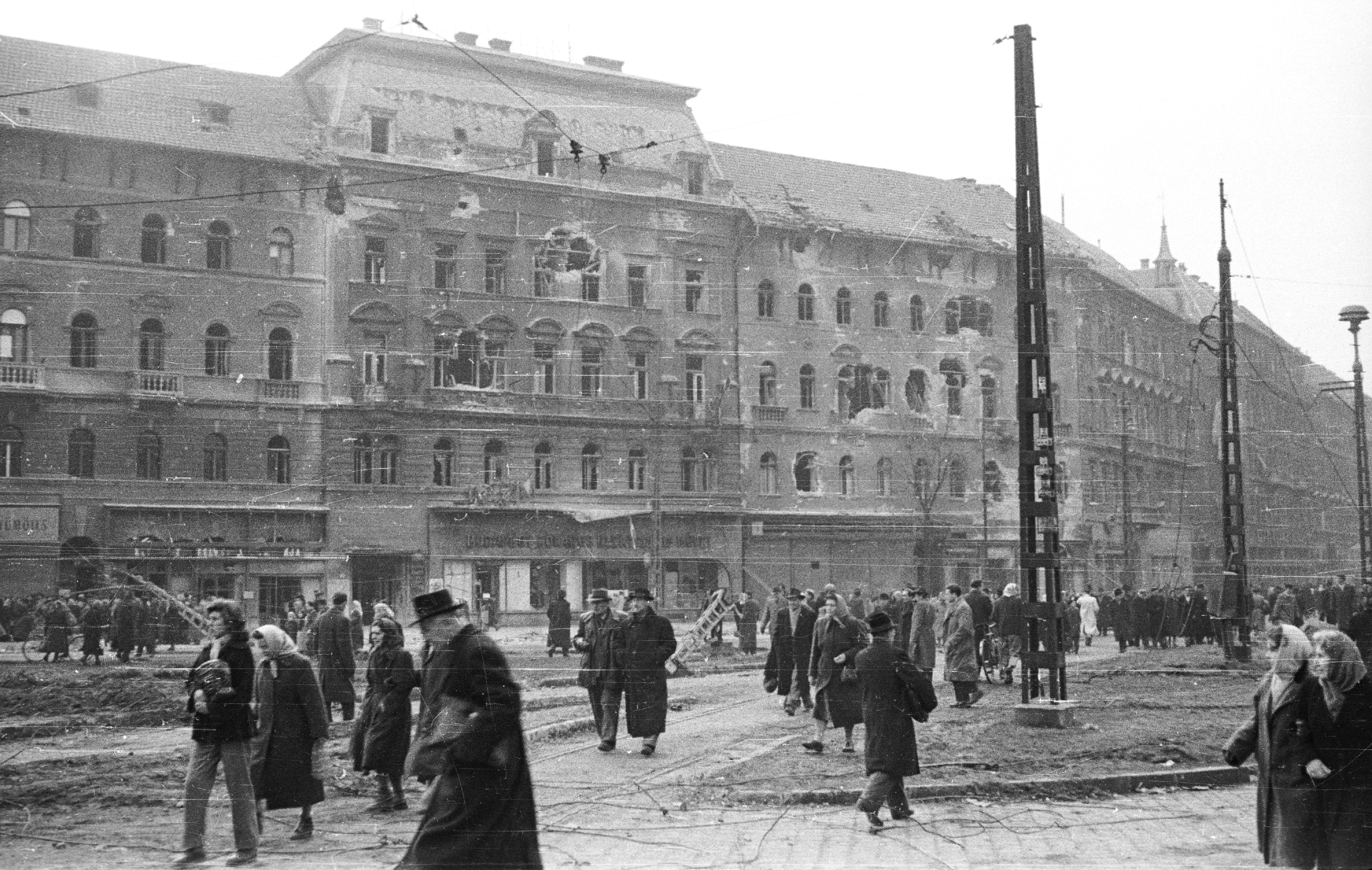 Baross tér 1, 2 és 3 sz. Location: Hungary, Budapest VIII. Tags: war damage, Budapest, revolution Title: Baross tér 1, 2 és 3 sz.